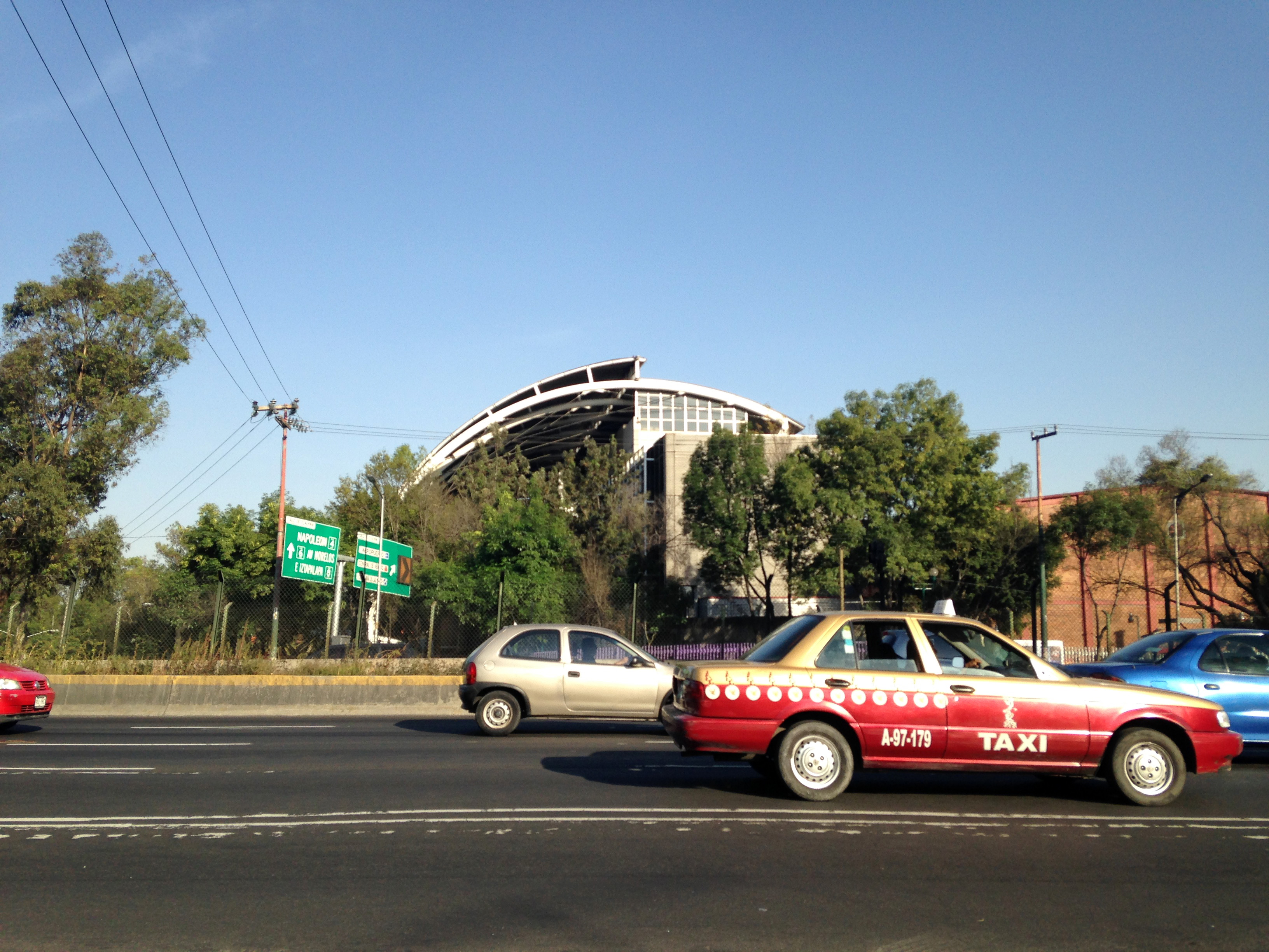 Escuela Nacional de Arte Teatral en el Centro Nacional de las Artes, Río Churubusco y Calzada de Tlalpan